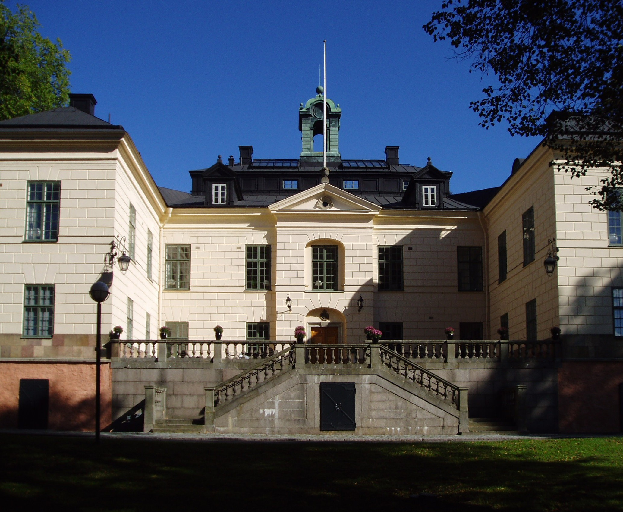 Näsby slott, Täby kommun